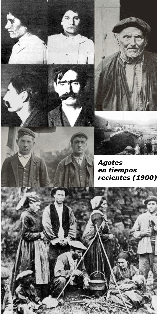 Agotes (cagots) de la localité de Bozate (Navarre espagnole), au début du siècle, assemblage de photographies de 1900, domaine public